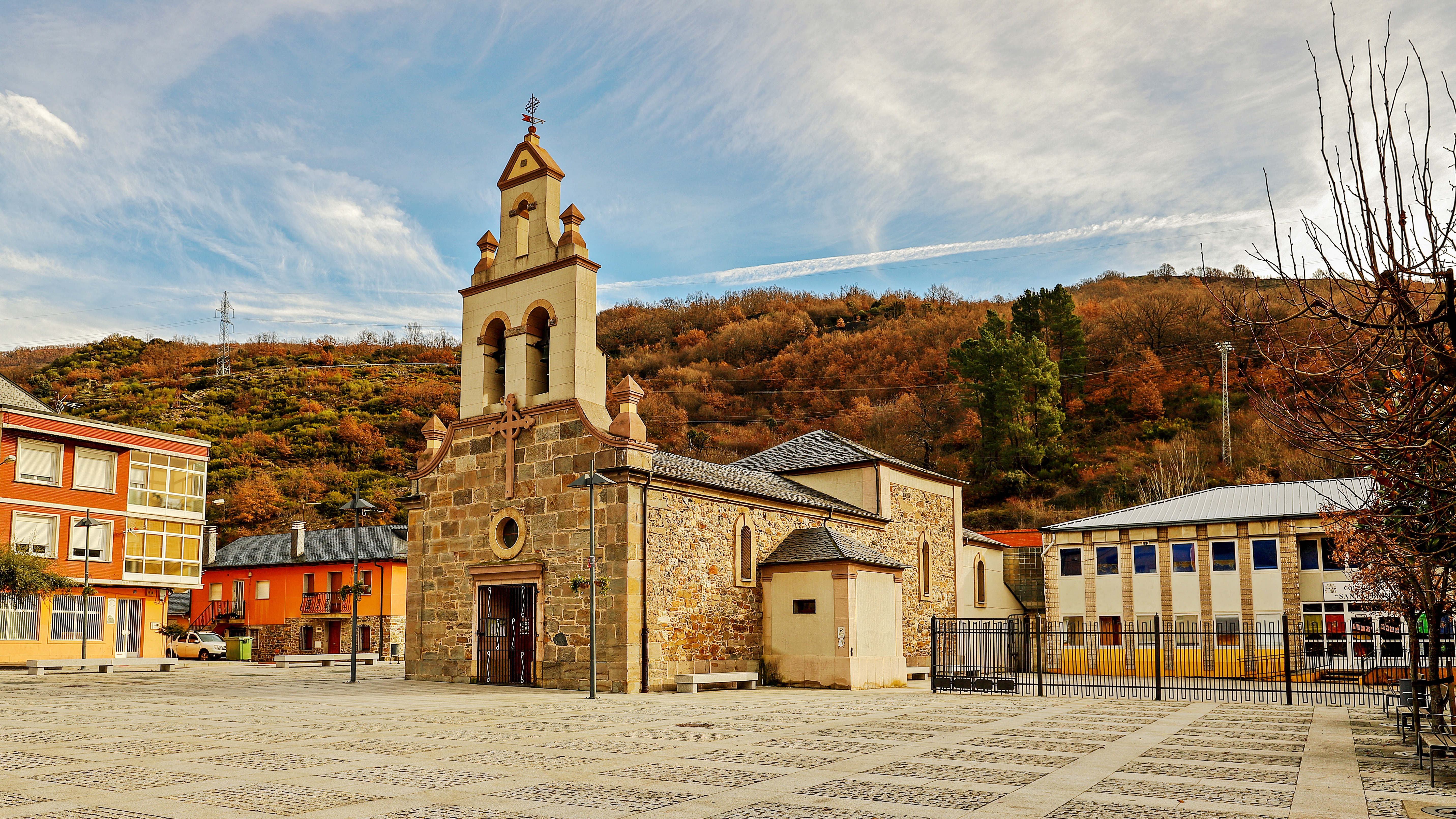 Matarrosa del Sil es una localidad que pertenece al municipio de Toreno, en la comarca de El Bierzo, provincia de León.